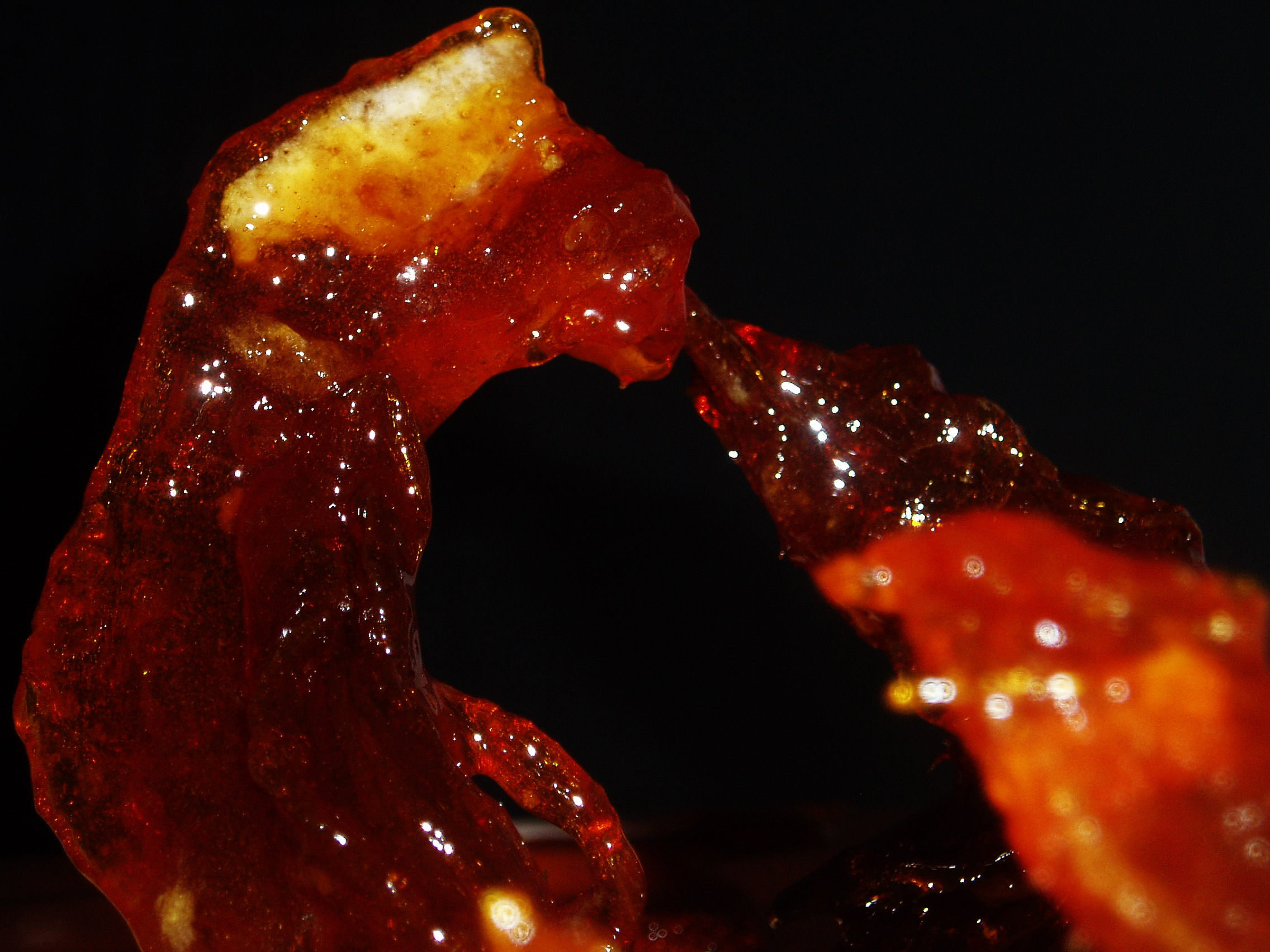 Caramel sculpté